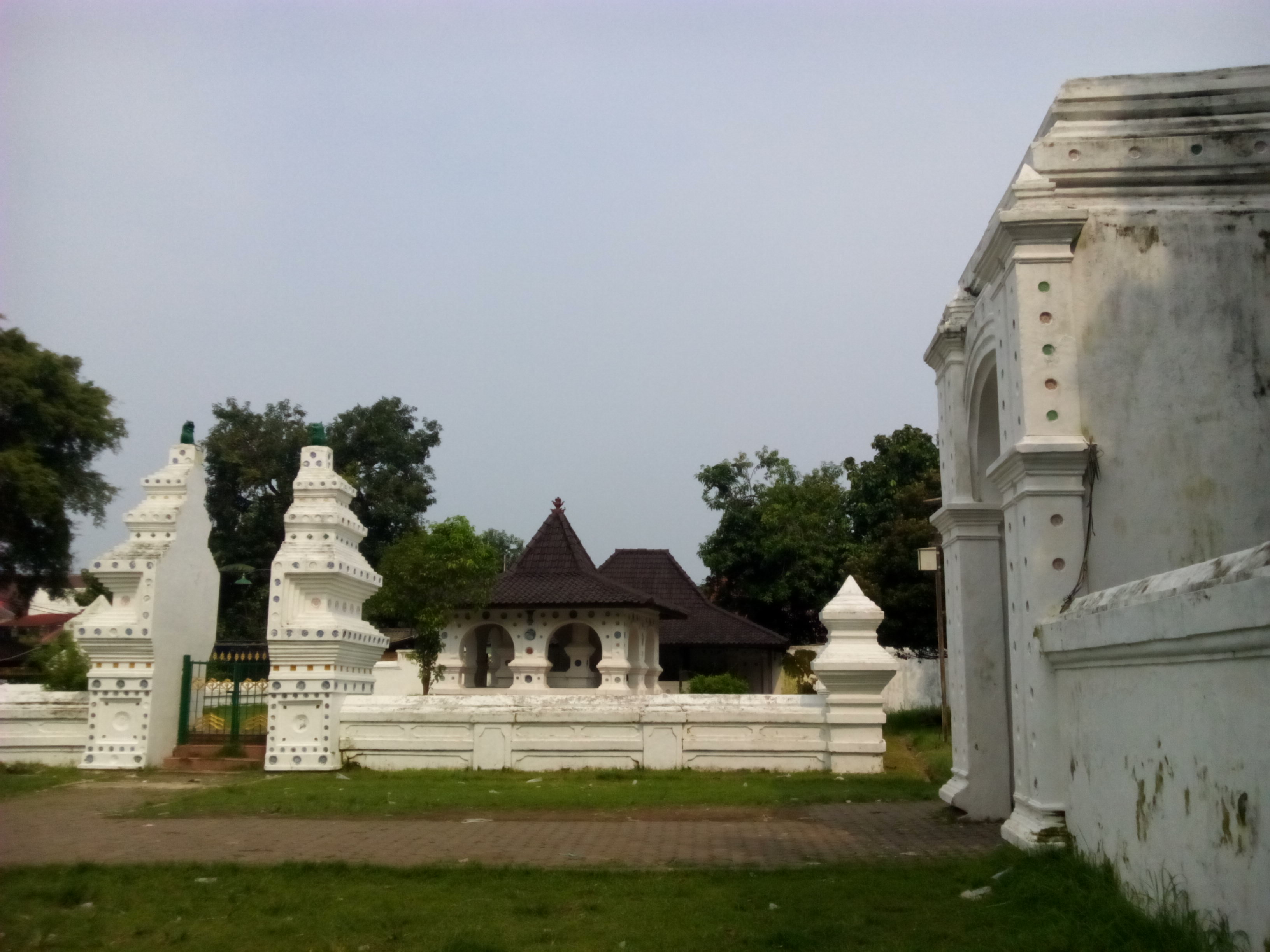 Komplek Keraton Kanoman Kota Cirebon, Provinsi Jawa Barat, Indonesia